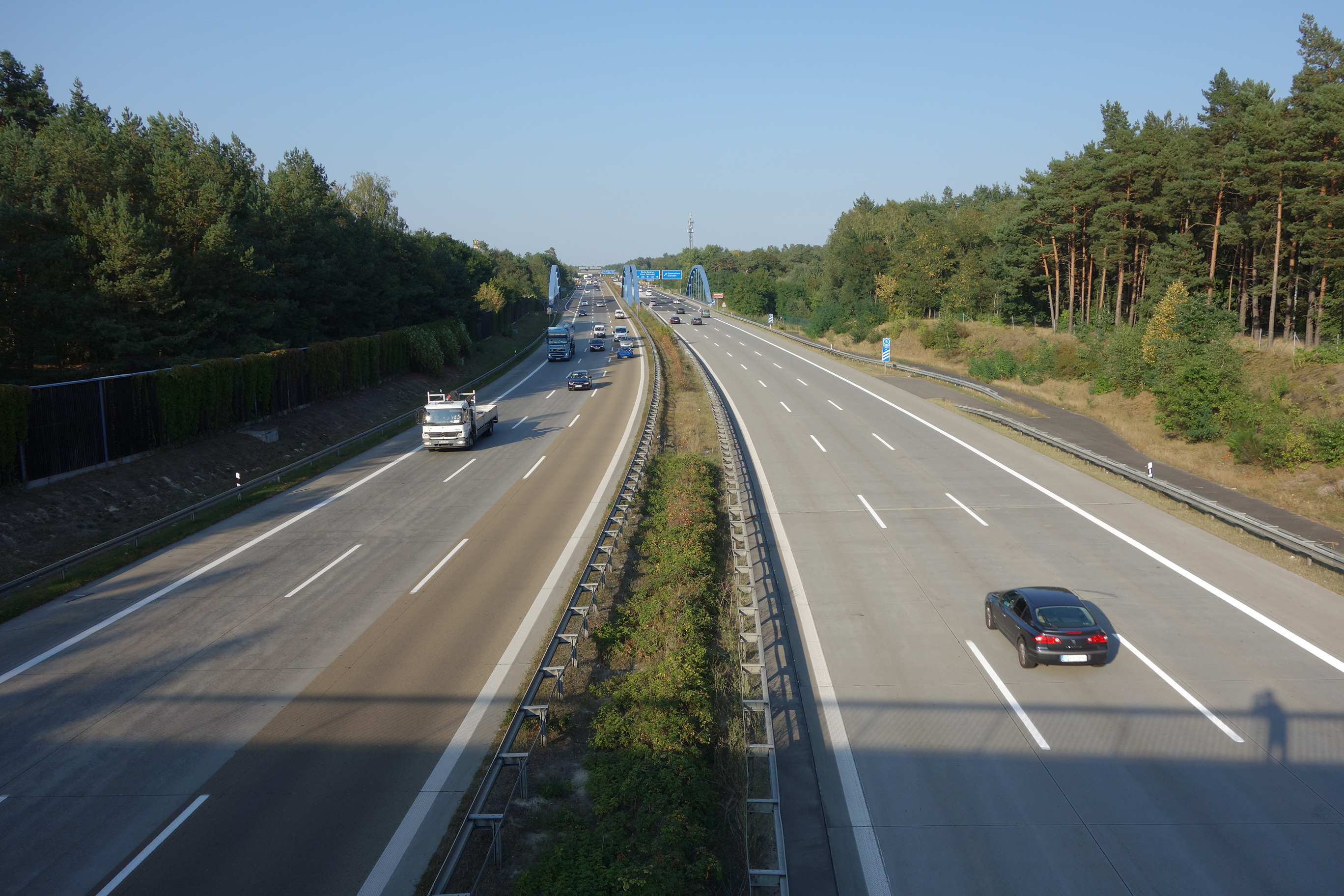 Bundesautobahn A115, Blick nach Norden von der Fußgängerbrücke südlich des Teltowkanals